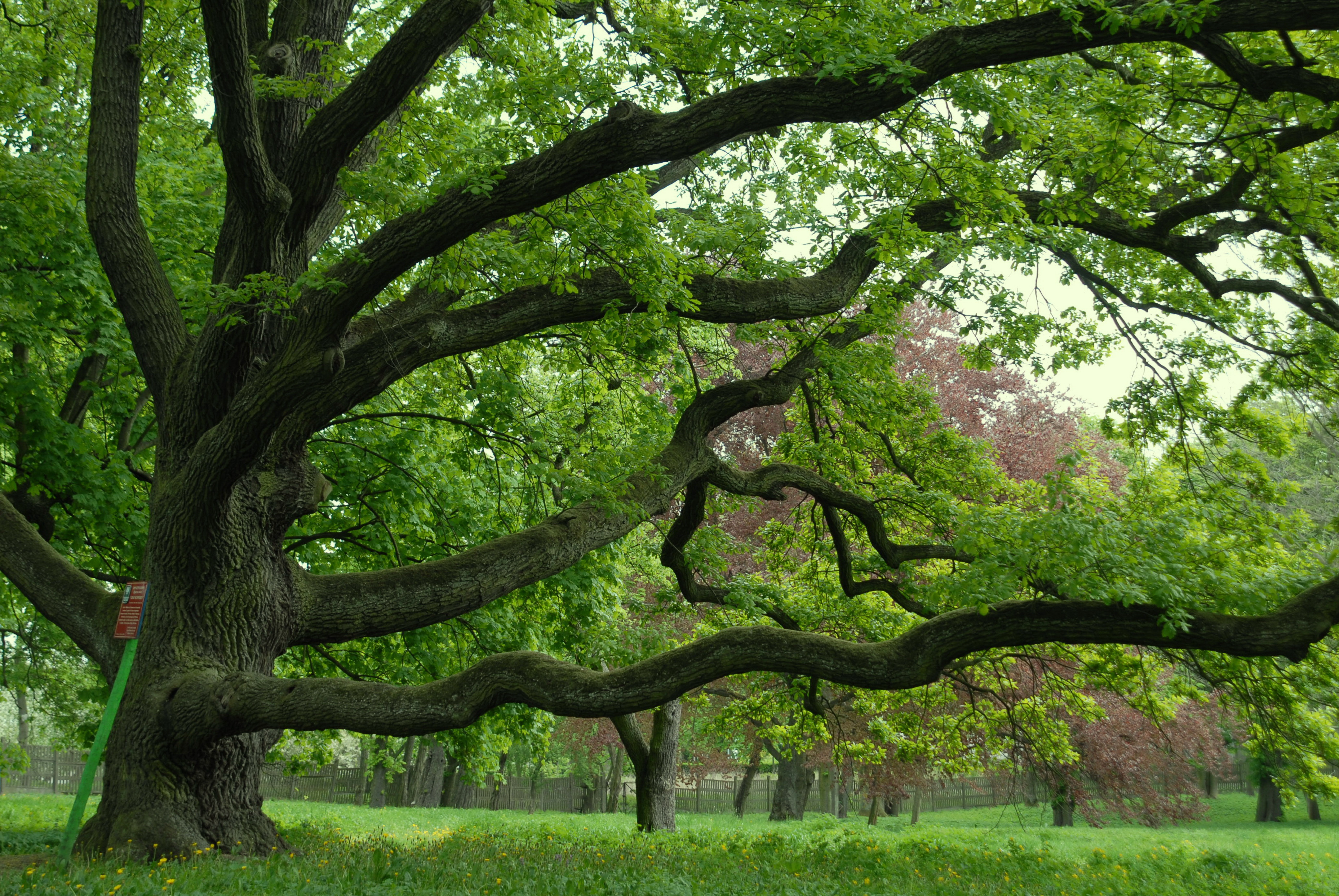 Sartowice - zespół dworski; park, XVIII/XIX.